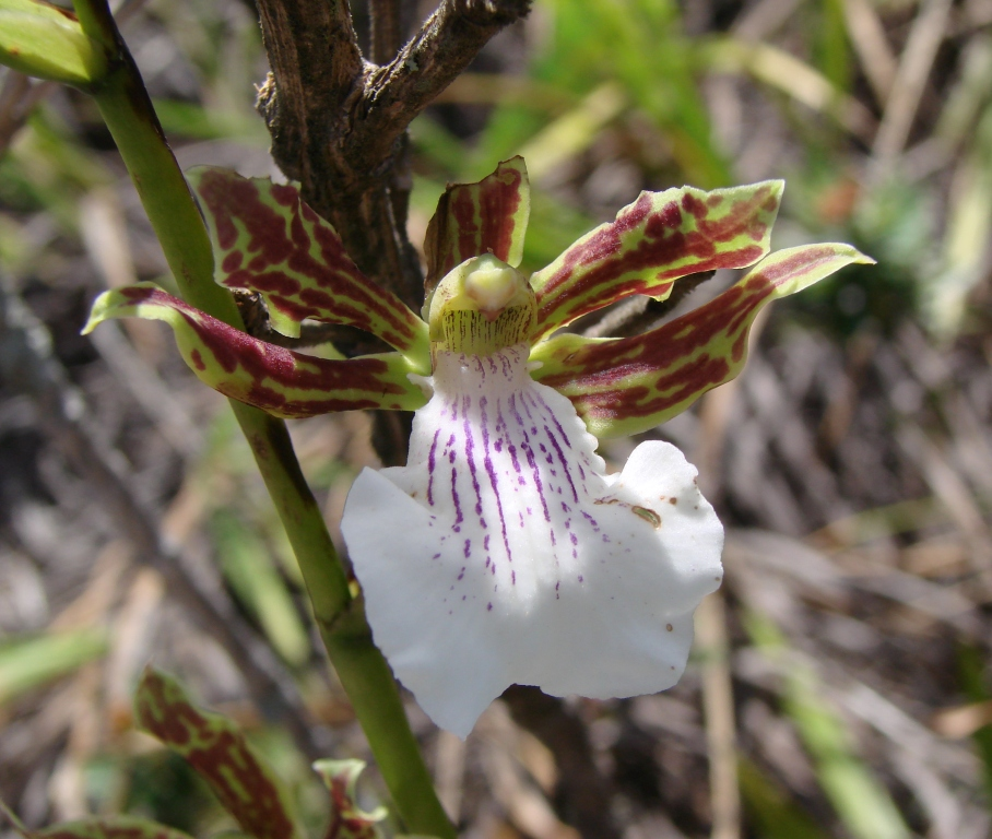 Zygopetalum sincoranum - ORCHIDACEAE - Parque Nacional da Chapada Diamantina - Palmeiras - Bahia - Brasil.